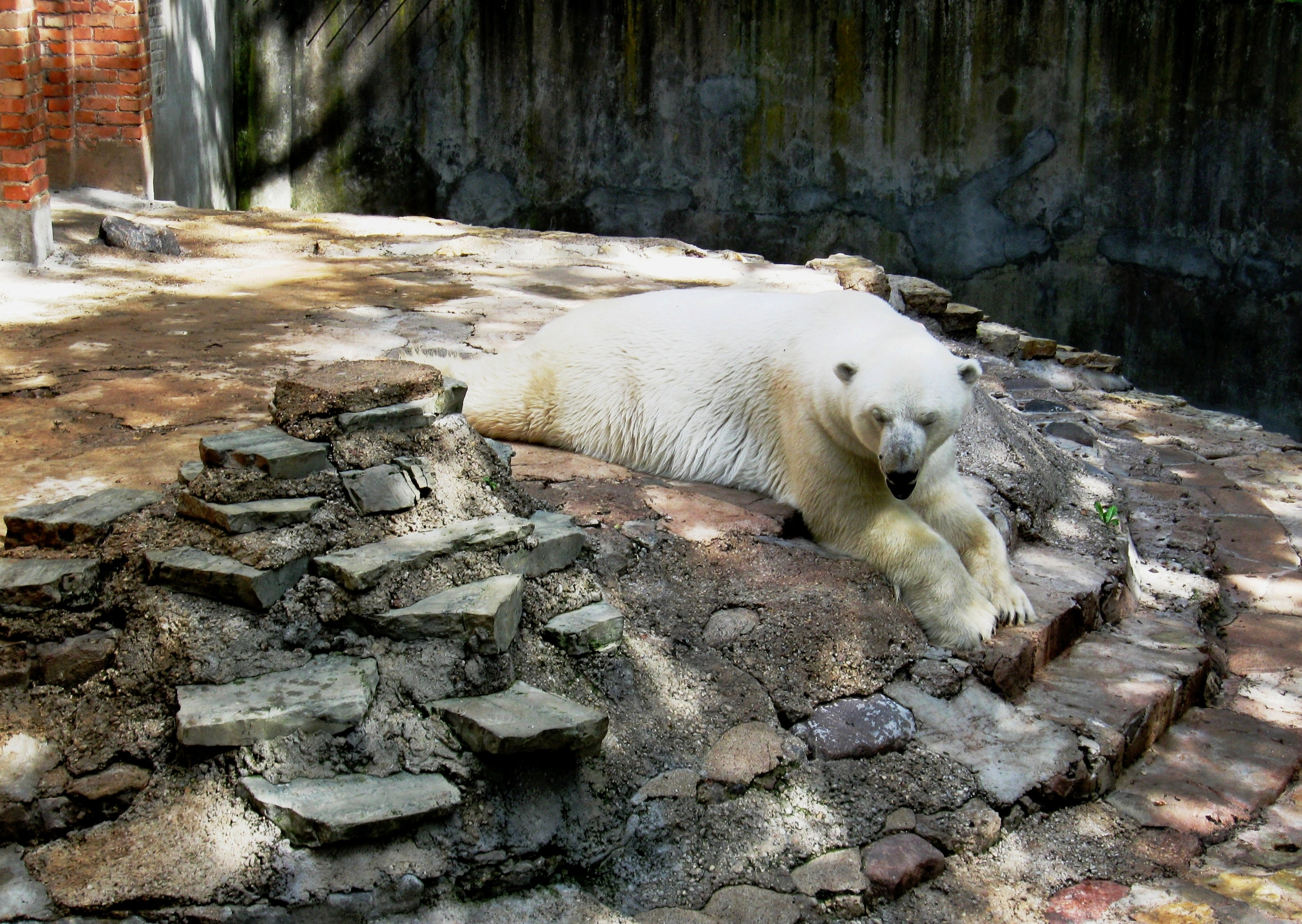 Baltasis lokys Kasparas Lietuvos zoologijos sode